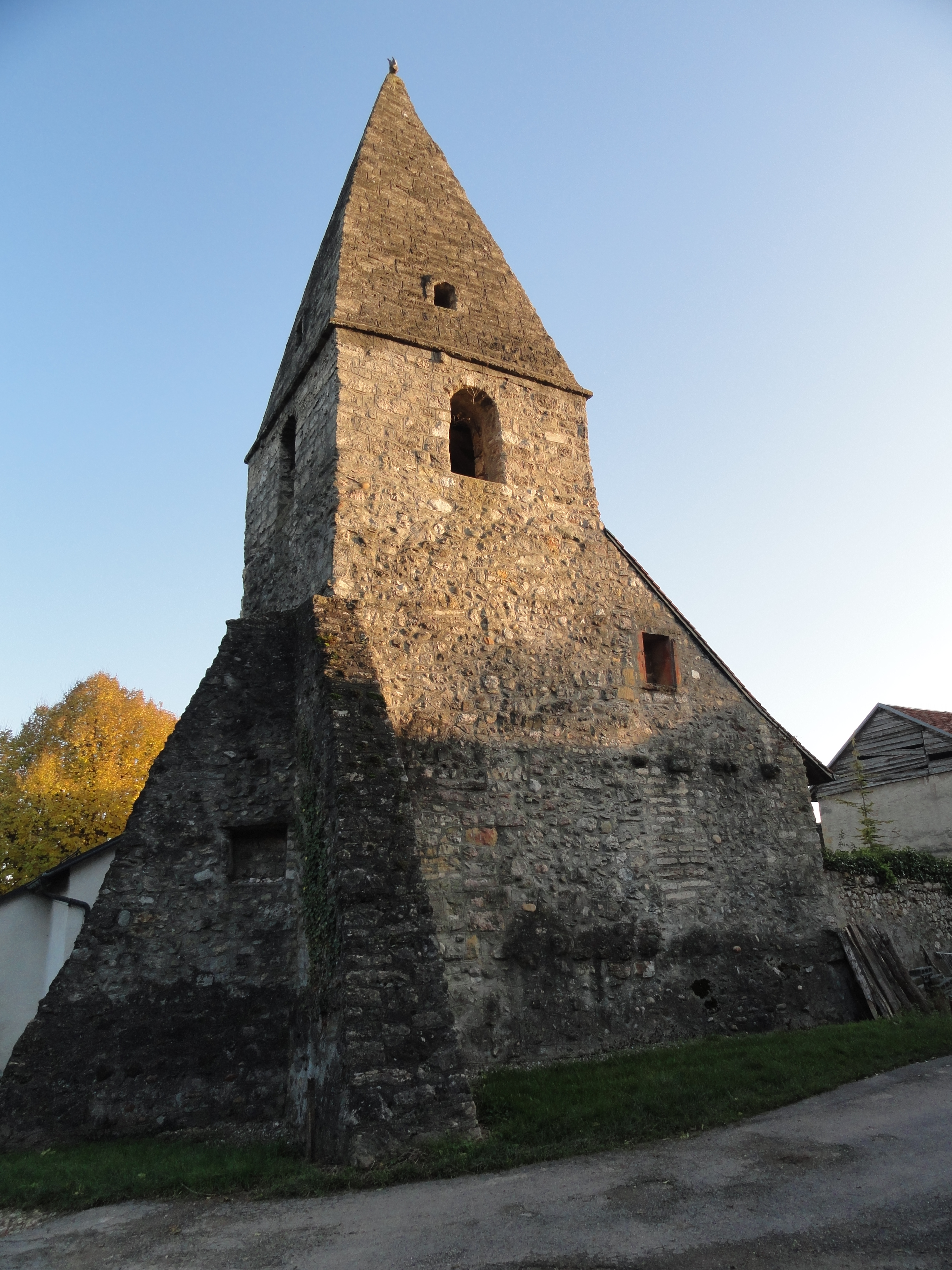 Orny, Le temple